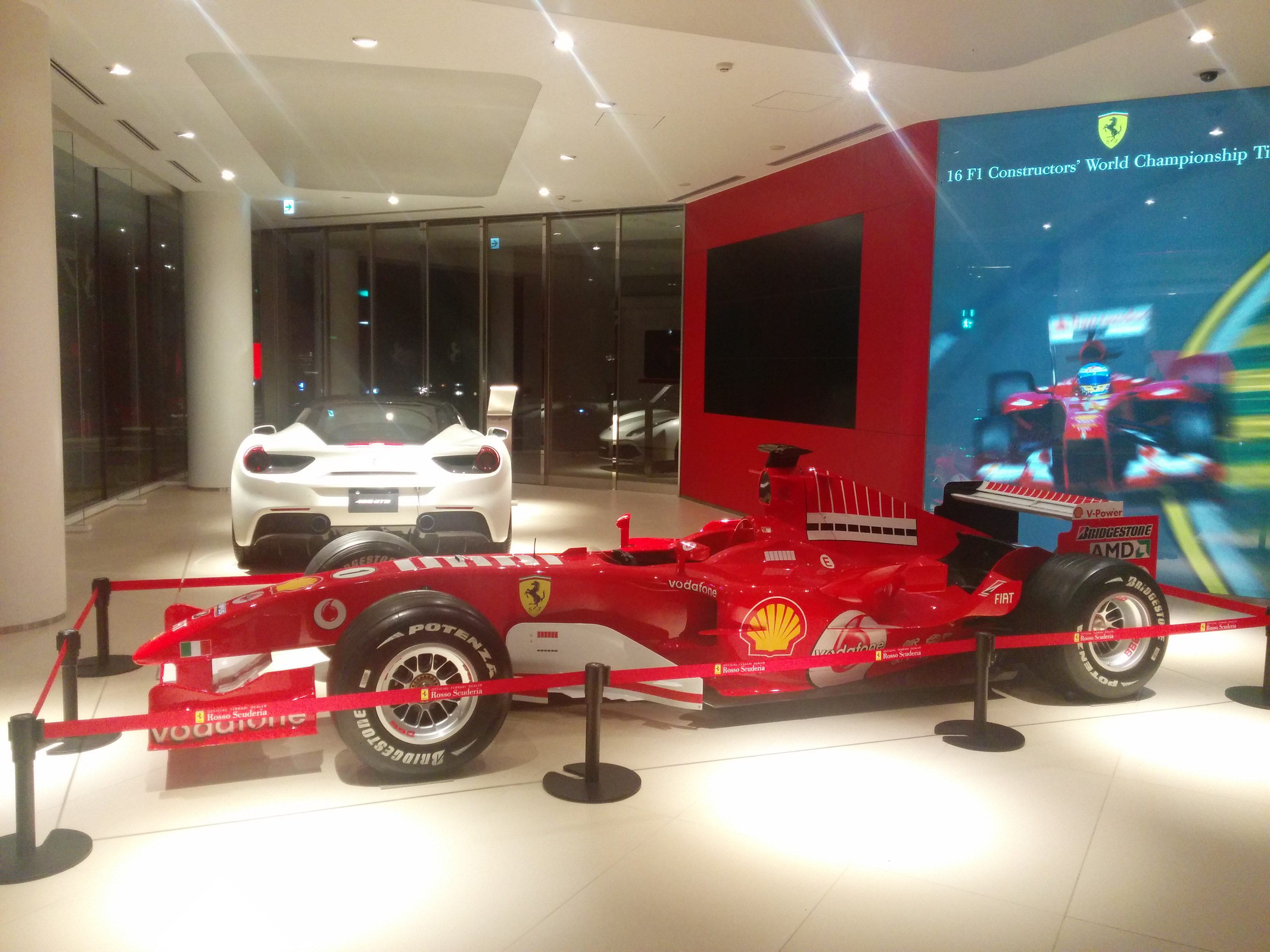 ロッソ・スクーデリア/ Rosso Scuderia, Tokyo Japan